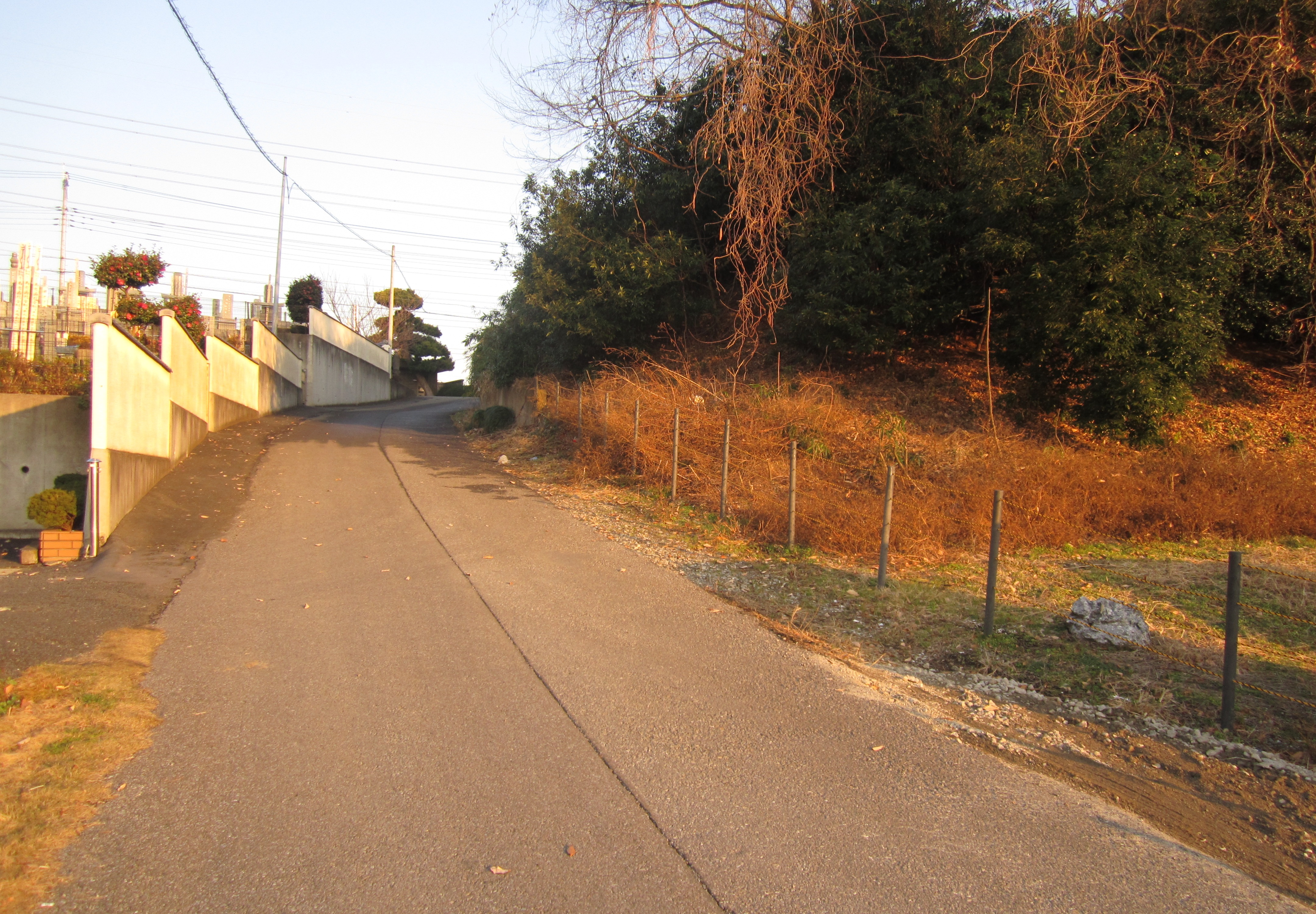 春日部市西部花積台地の坂道。春日部市にはこのような台地状地形が点在する。